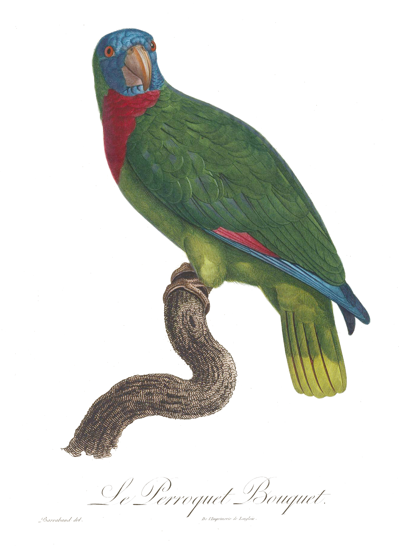 Le Perroquet Bouquet